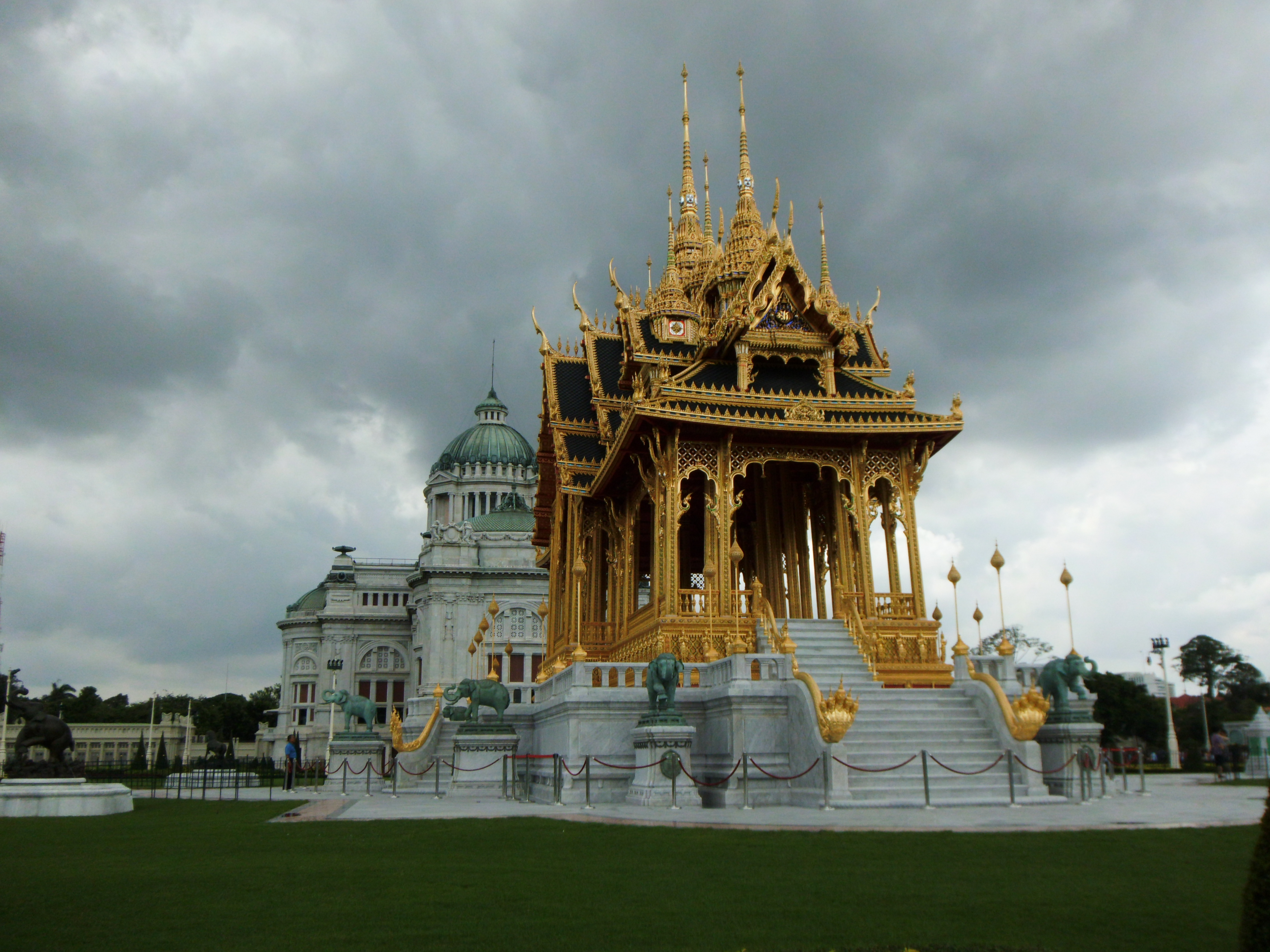 พระที่นั่งอนันตสมาคม